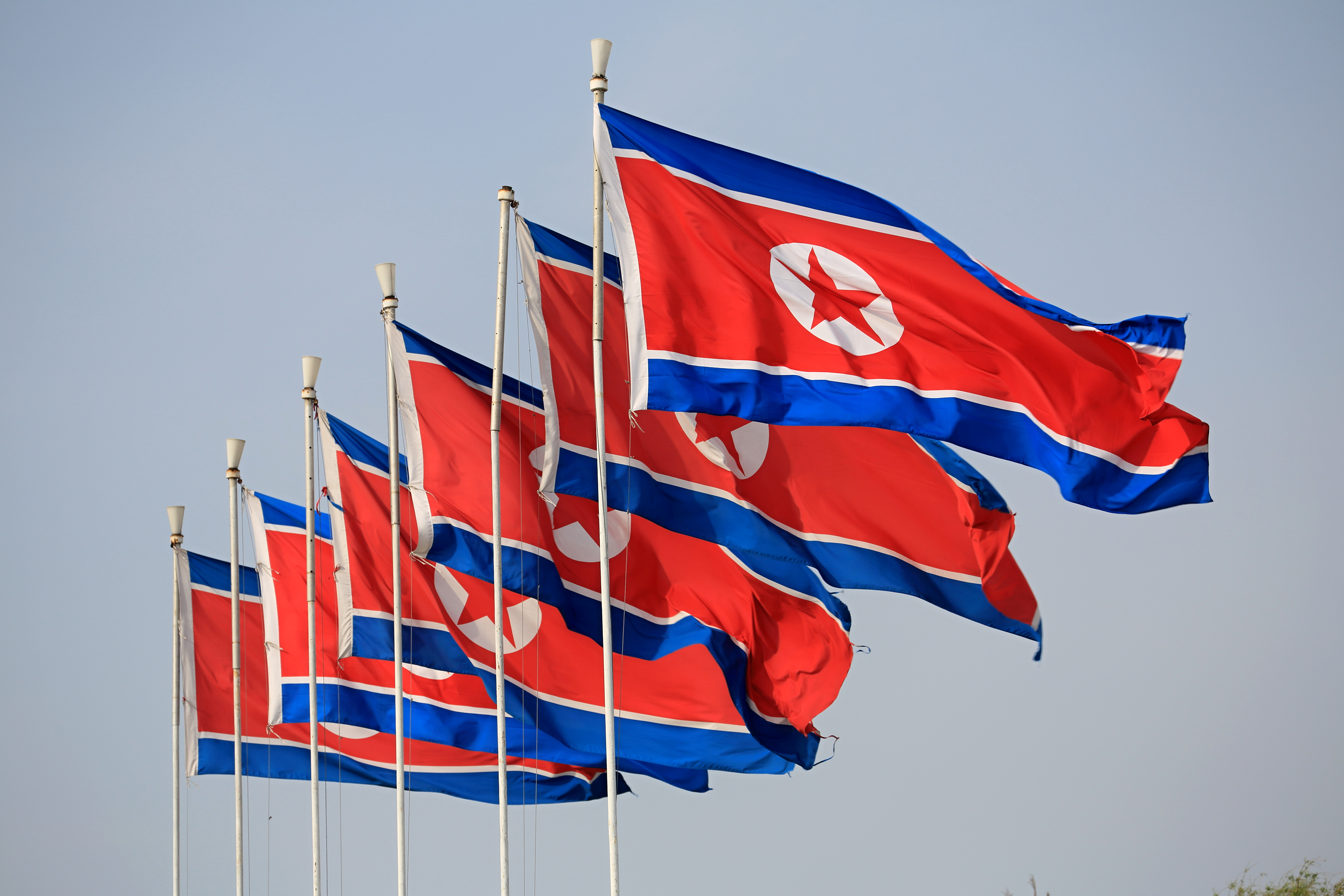 Vlajky